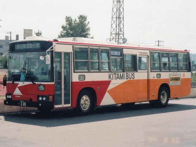 Kitami Bus Mitsubishi P-MP218P改 from Kanachu at Kitami Sta.